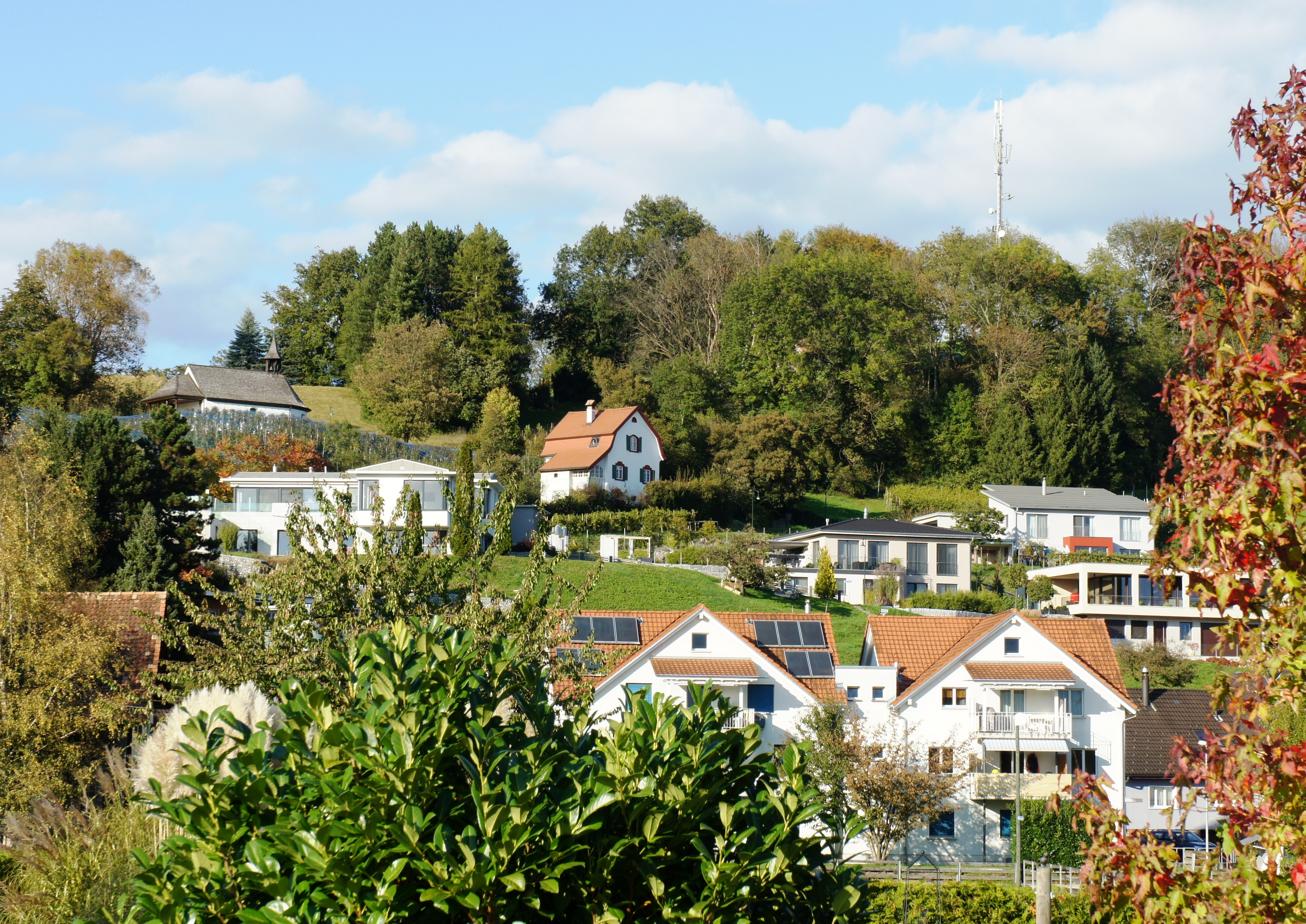 Blick von Süden zum Montlingerberg, der im unteren Bereich mit Ein- und Mehrfamilienhäusern bebaut ist, am linken mittleren Bildrand erkennt man über den Reben die Sankt Anna-Kapelle, rechts davon (etwa Mitte des Bildes) steht das Atelier-Haus der Künstlerin Hedwig Scherrer (1878–1940)